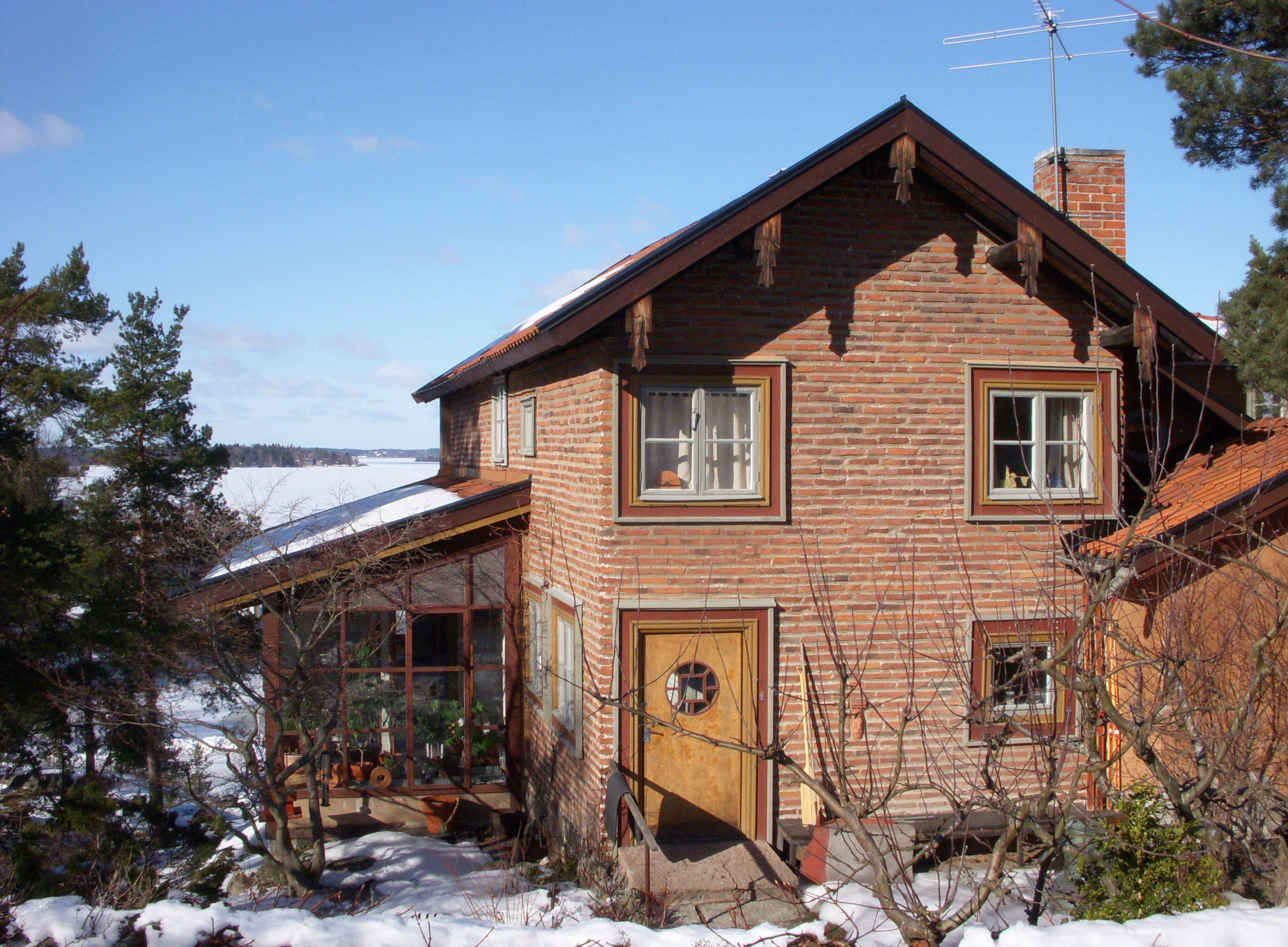 Villa Arken på Lidingö, Cyrillus Johanssons hem